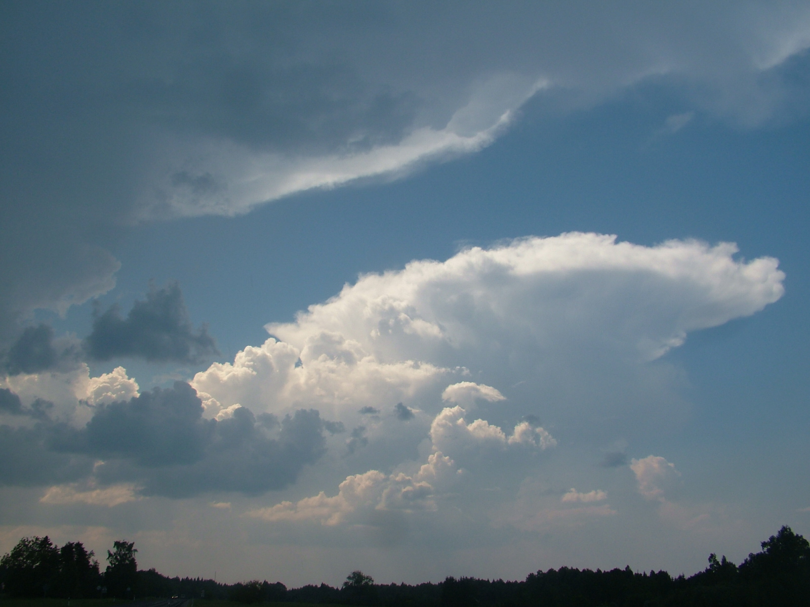 Rünksajupilved (Cumulonimbus incus) Laitses (Eesti)